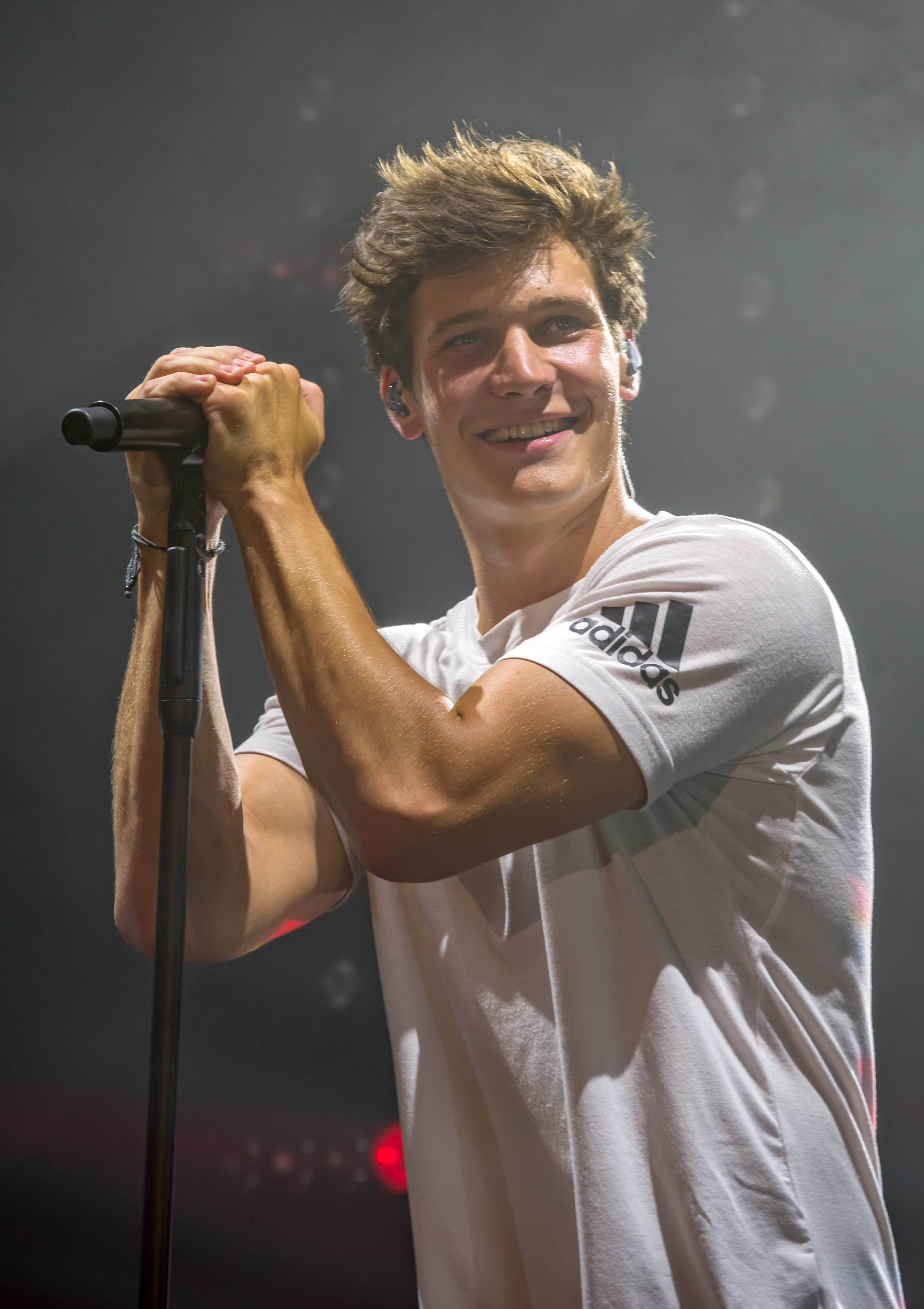 Bilder vom Zelt Musik Festival 2018 in Freiburg im Breisgau Auftritt Wincent Weiss am 23. Juli 2018 im Zirkuszelt